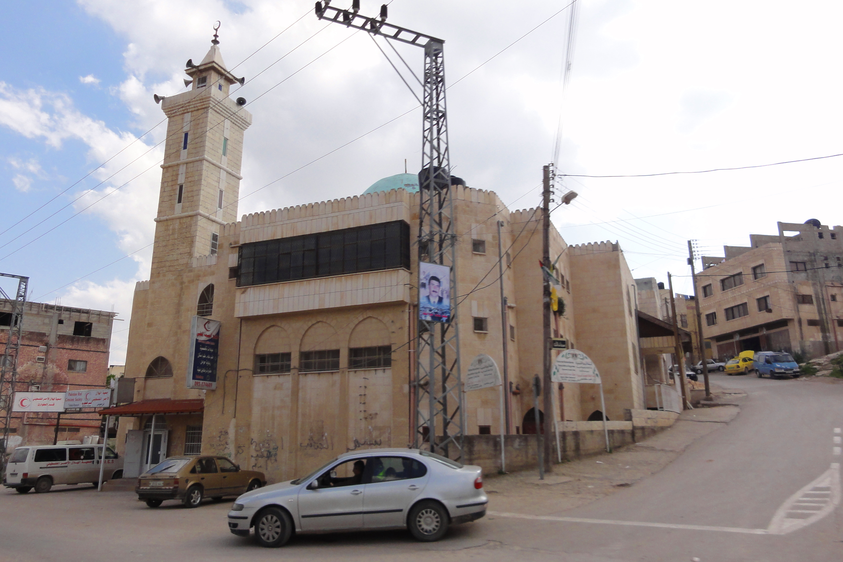 Tubas Mosque